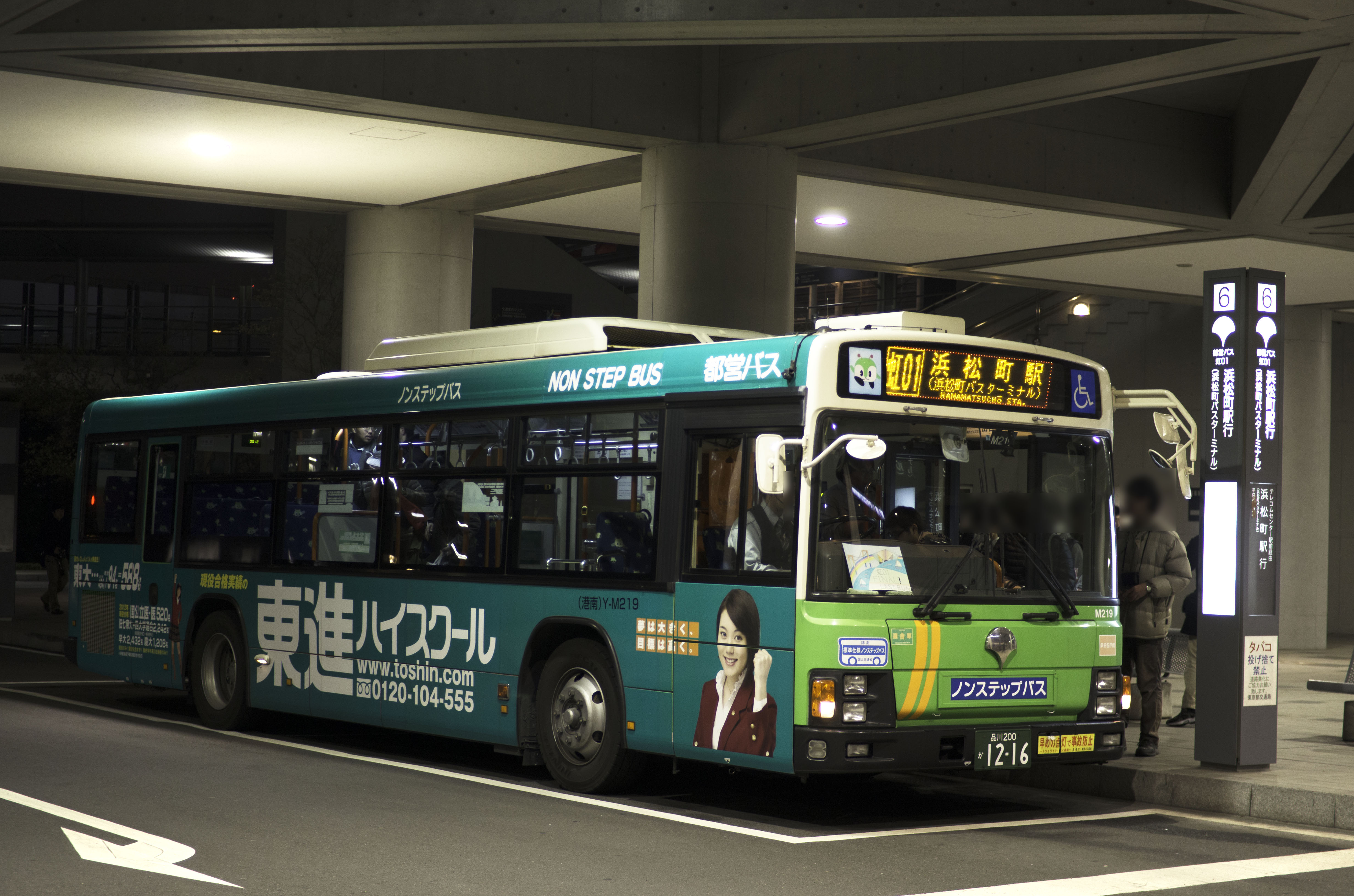 都営バス虹01系統Y-M219 虹01系統東京ビッグサイト発最終便